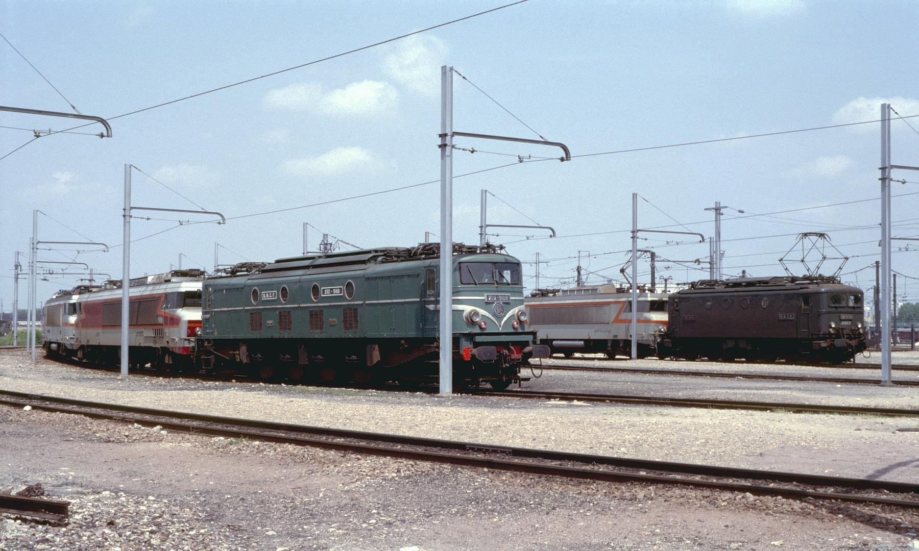 Le grill électrique du dépôt de Villeneuve-St-Georges le 2 juin 1985 avec les CC 6562, 2D2 9108, BB 7378, et BB 8238.